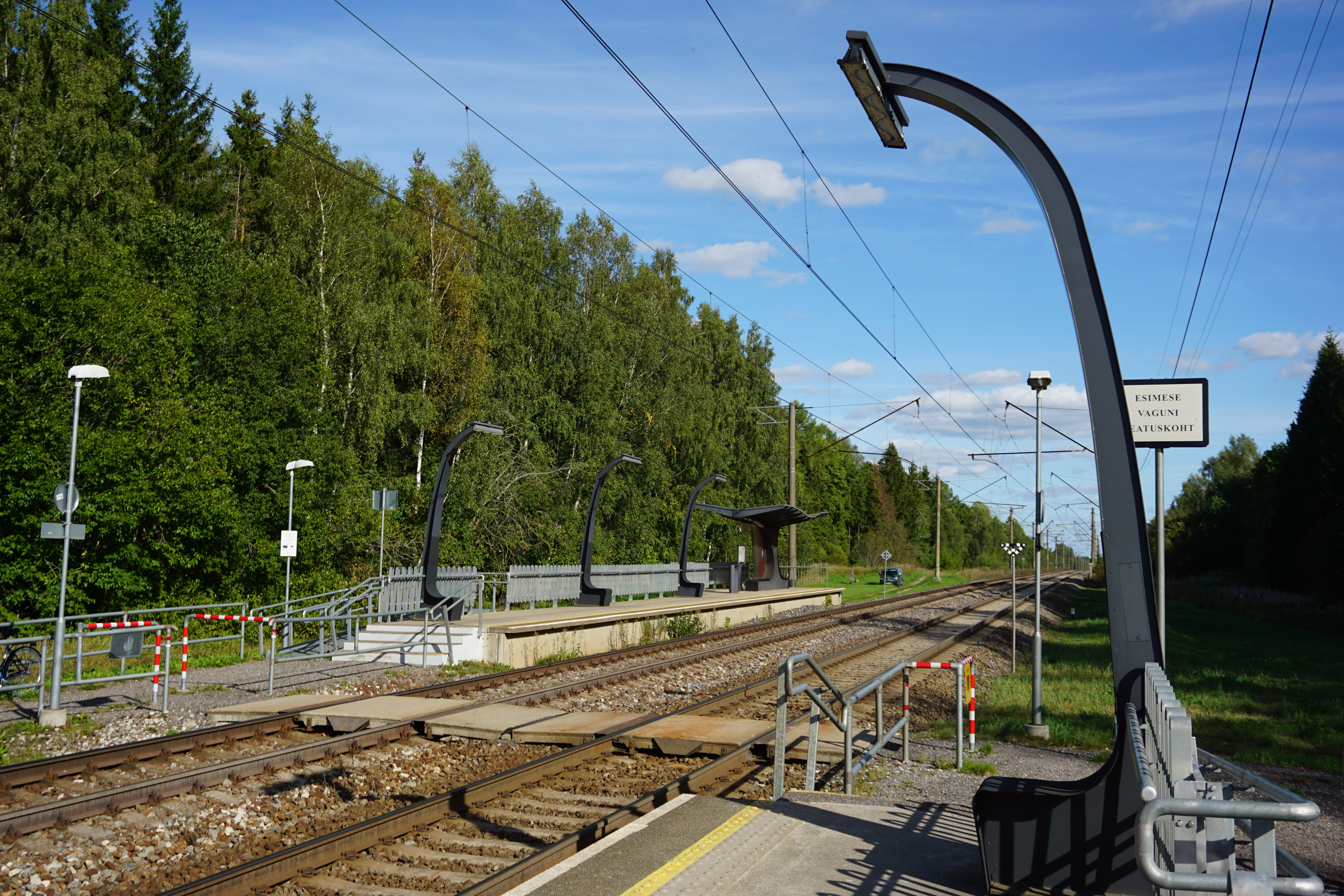 Kulli raudteepeatus